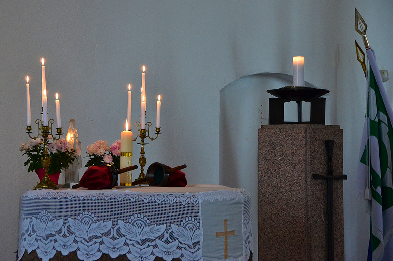 Vaade Tori kiriku altarile veteranipäeva jumalateenistusel